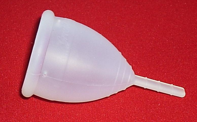 Coletor menstrual da marca Green Donna, tamanho 1.